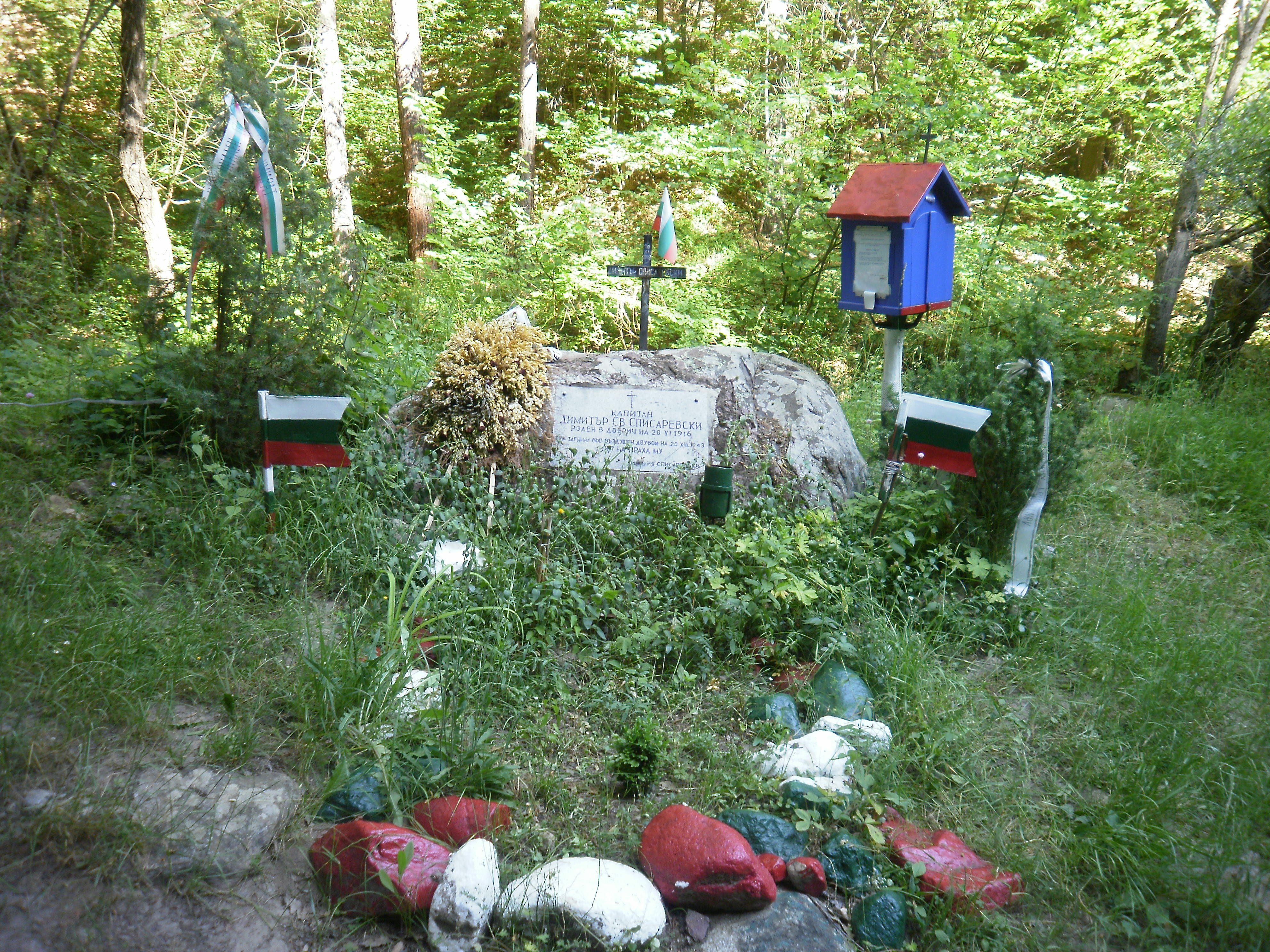 Лобното място на Димитър Списаревски в Долни Пасарел.